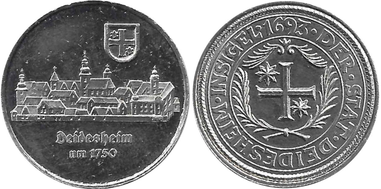 Die Gedenkmünze erinnert an das Siegel der Stadt aus dem Jahr 1693. Dieses zeigte ein schwebendes Kreuz, das mit zwei achtstrahligen Sternen bewinkelt war.